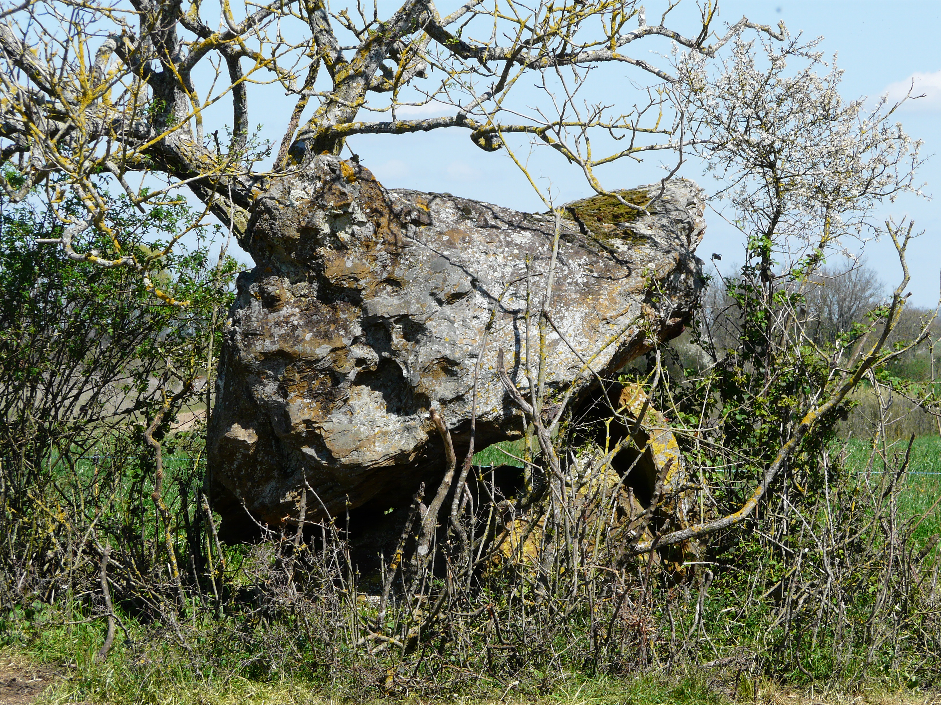 Le dolmen de Peyre Nègre, Beaumont-du-Périgord, Dordogne, France.